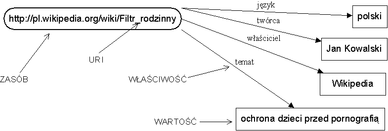 Przykład diagramu wyrażeń w modelu RDF